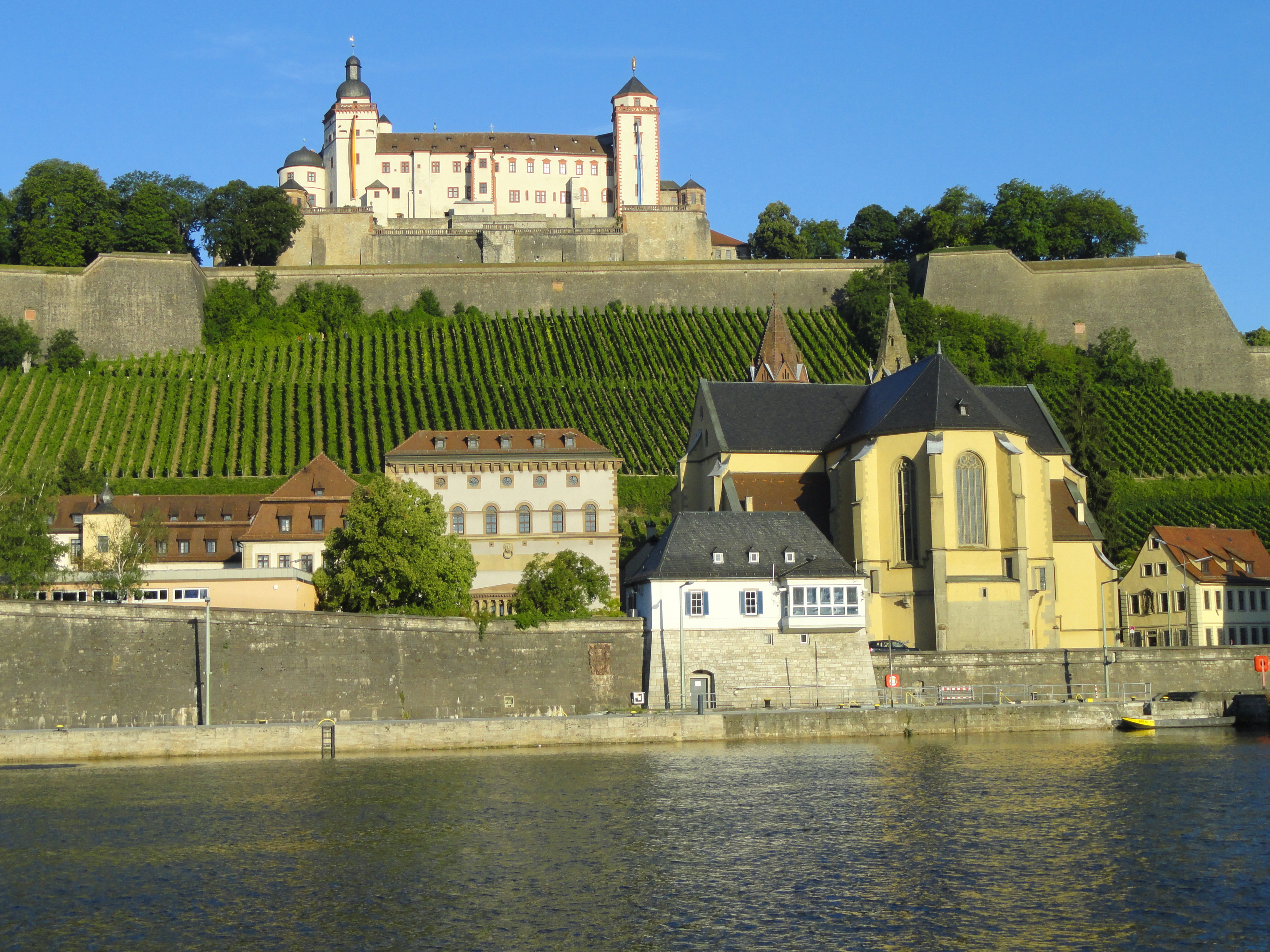 Feste Marienberg, Würzburg, Germany.